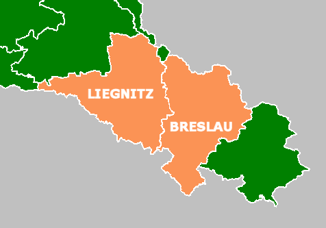 Regierungsbezirke in Neder-Silezië 1922